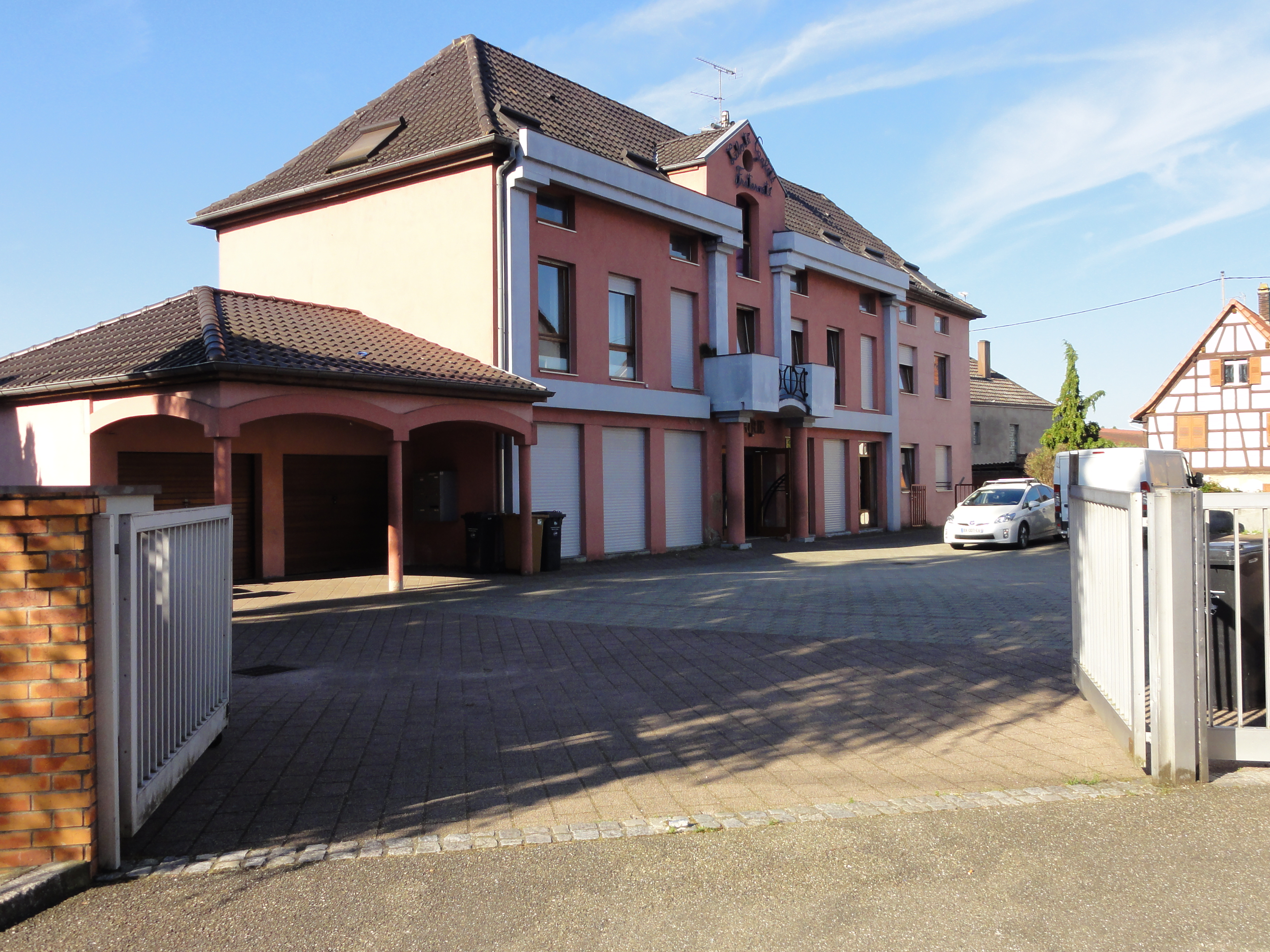 Alsace, Bas-Rhin, Wilwisheim, Mairie (XXe).